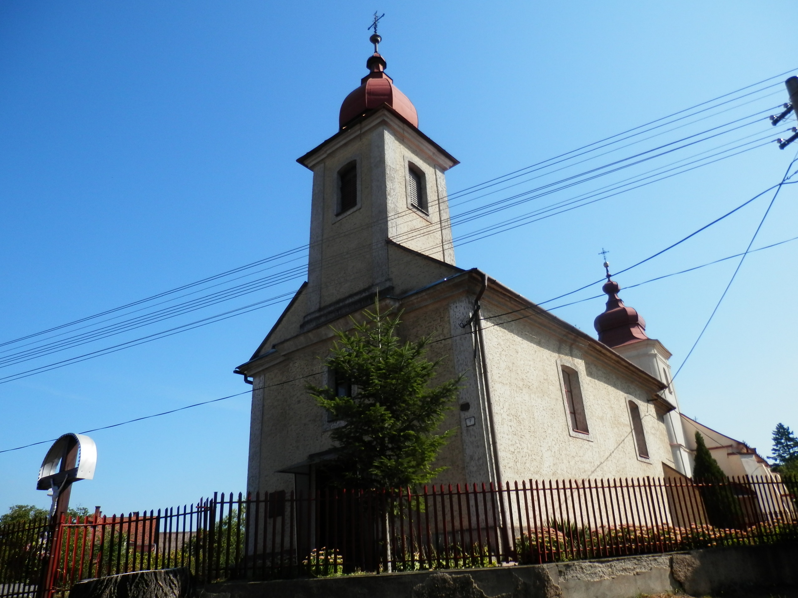 V popredí katolícky kostol svätej Barbory. Národná kultúrna pamiatka. V pozadí evanjelický kostol v obci Opiná, okres Košice okolie.